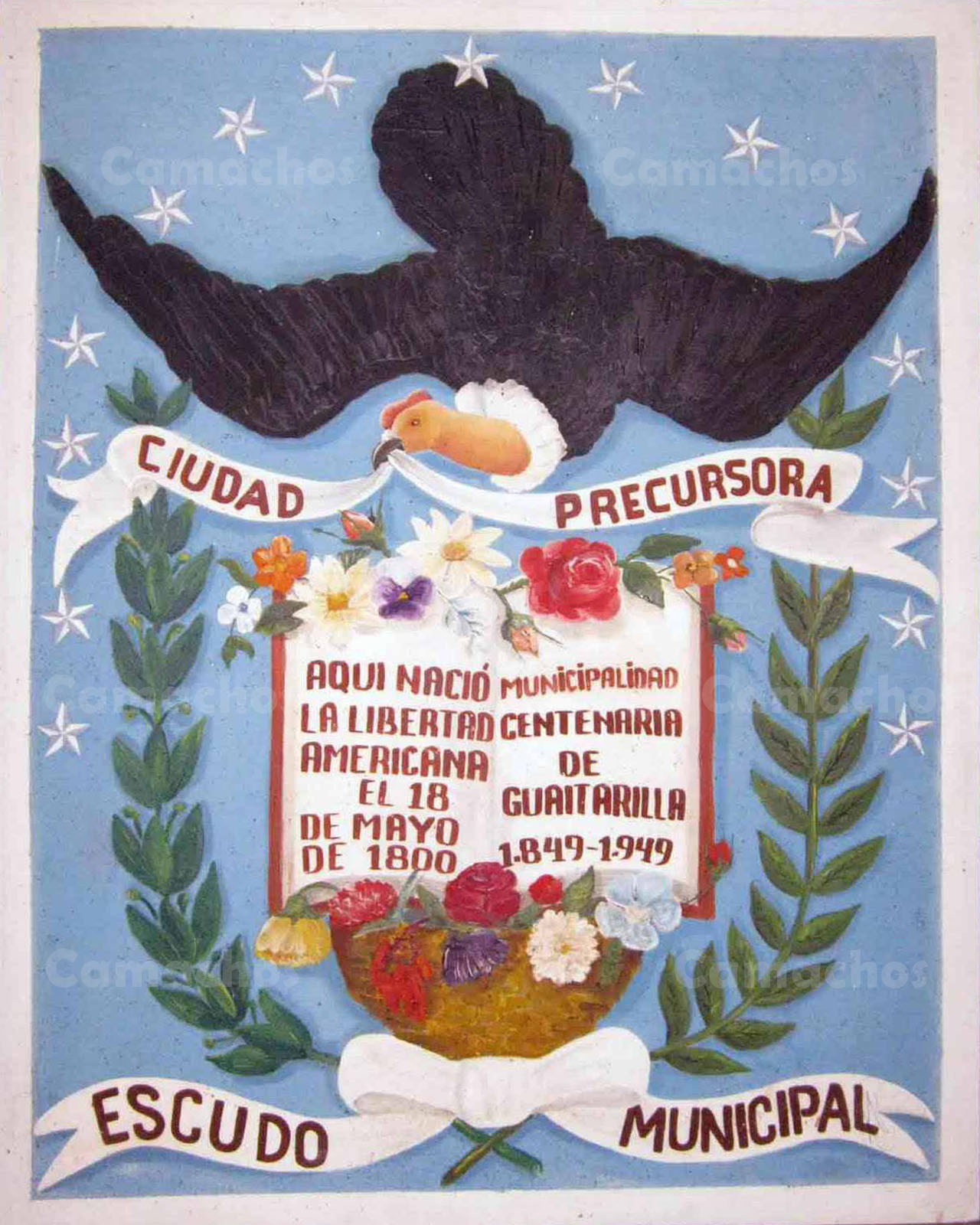 escudo